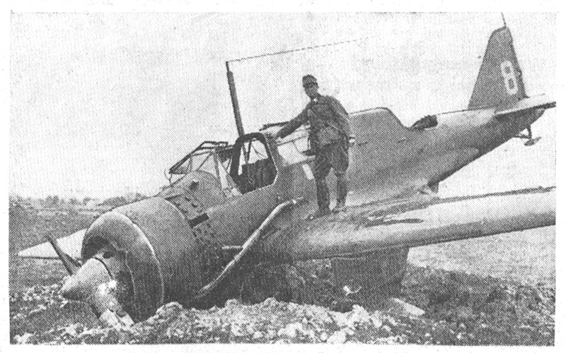 Zestrzelony samolot PZL.23 Karaś we wrześniu 1939 roku.